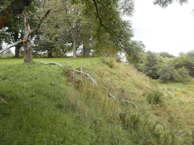 Vaade idapoolsele bastionile lõunabastioni asukohast.